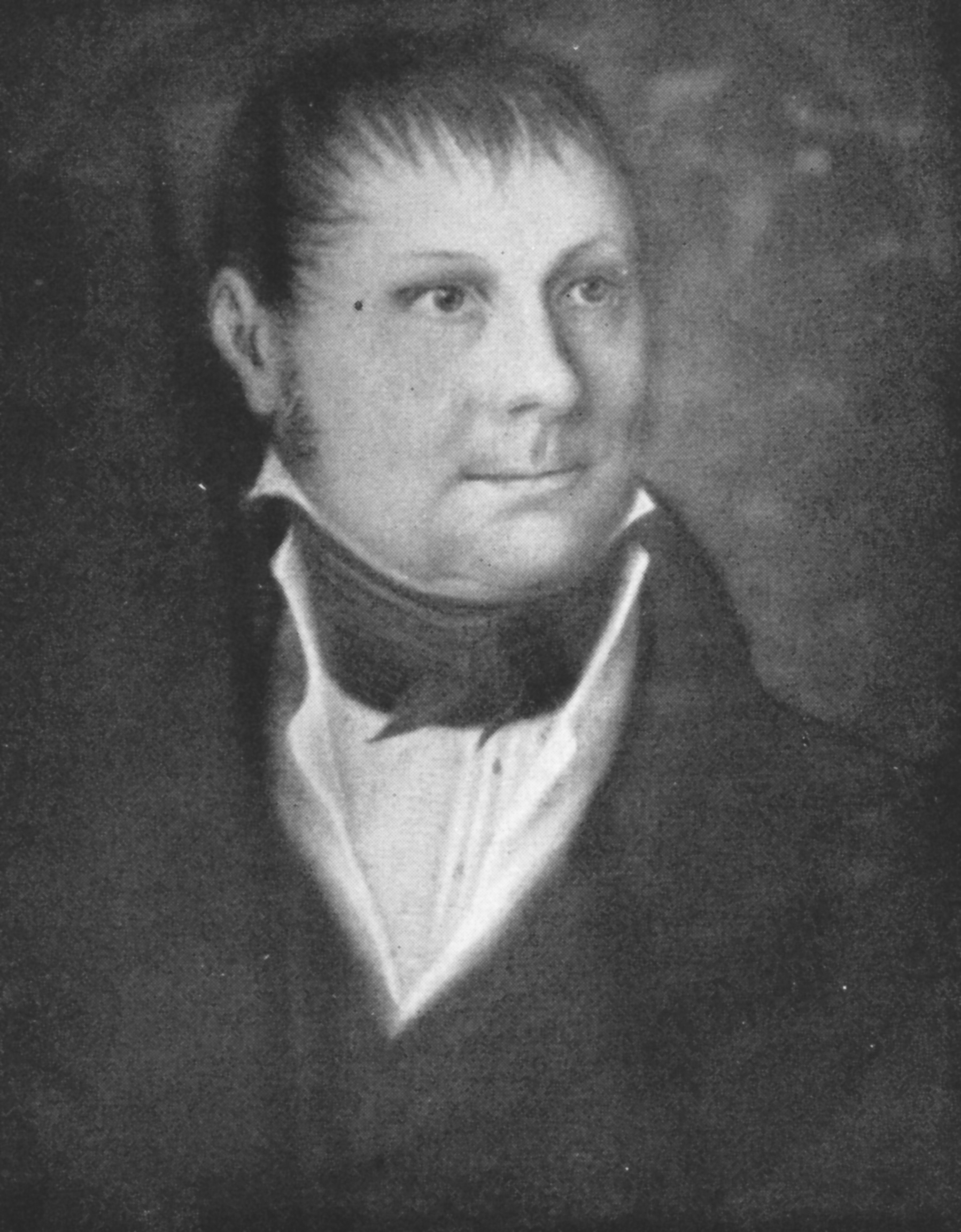 Johann Joachim Schümann (* 1776; † 1861), Lübecker Kapitän